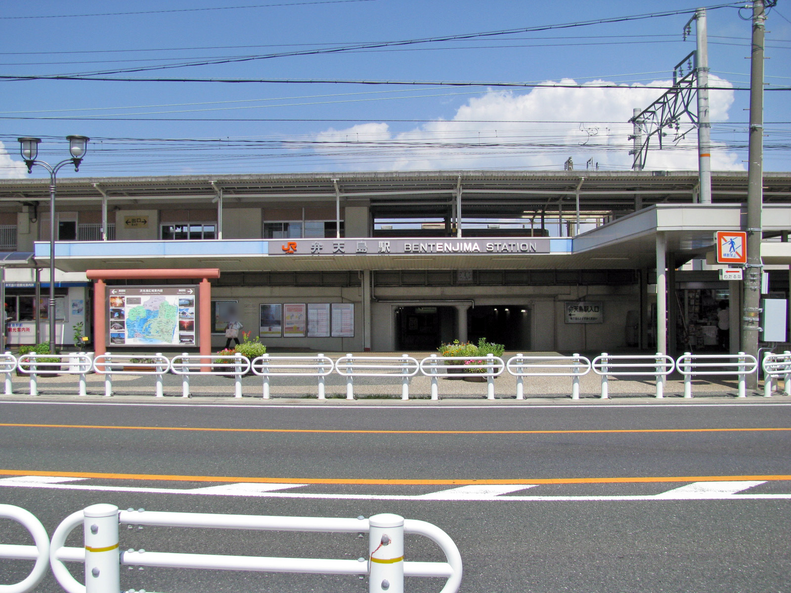 東海道本線弁天島駅